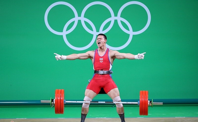 وزنه‌برداری در بازی‌های المپیک تابستانی ۲۰۱۶ – ۹۴ کیلوگرم مردان